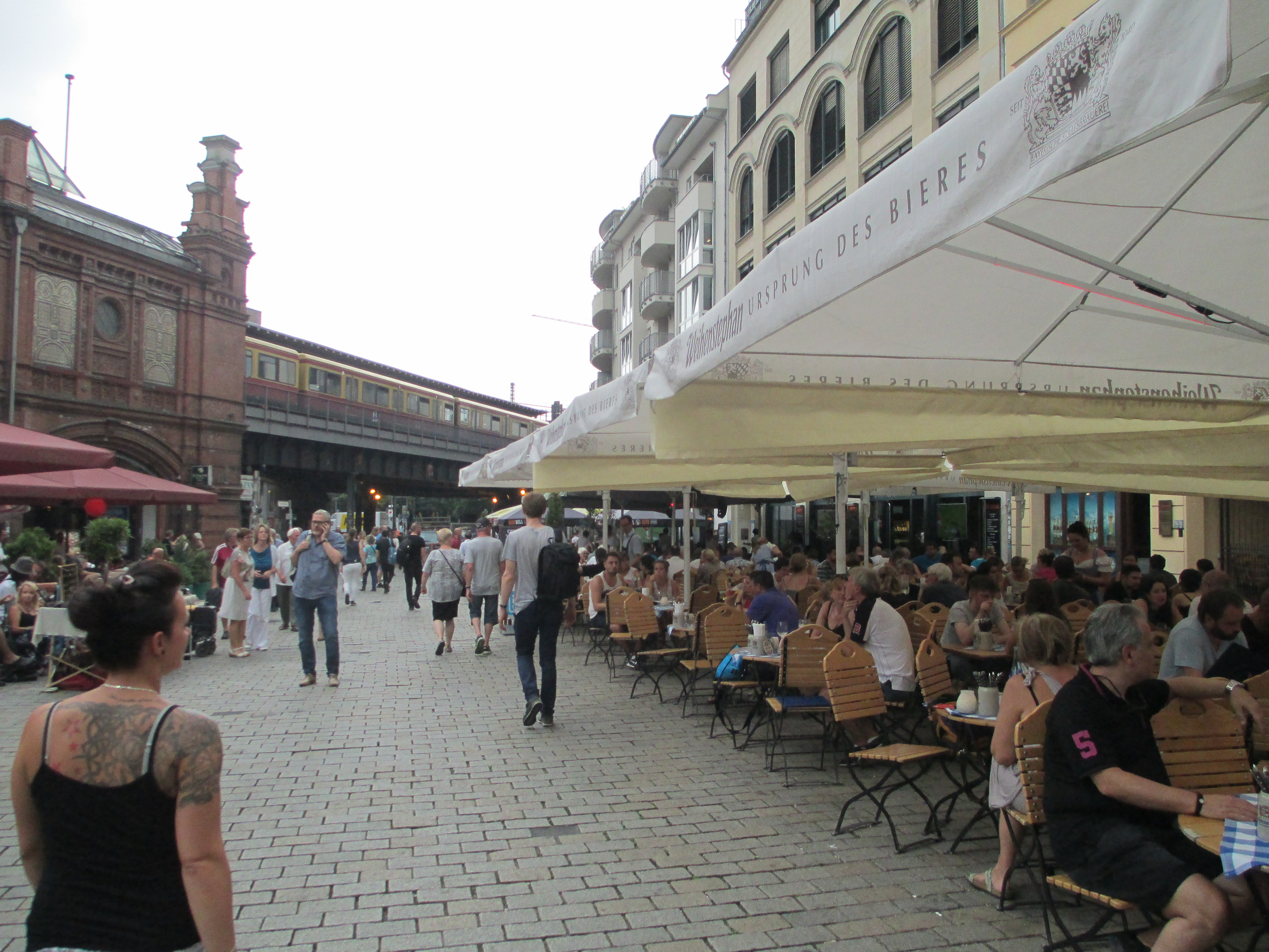 האקשר מרקט